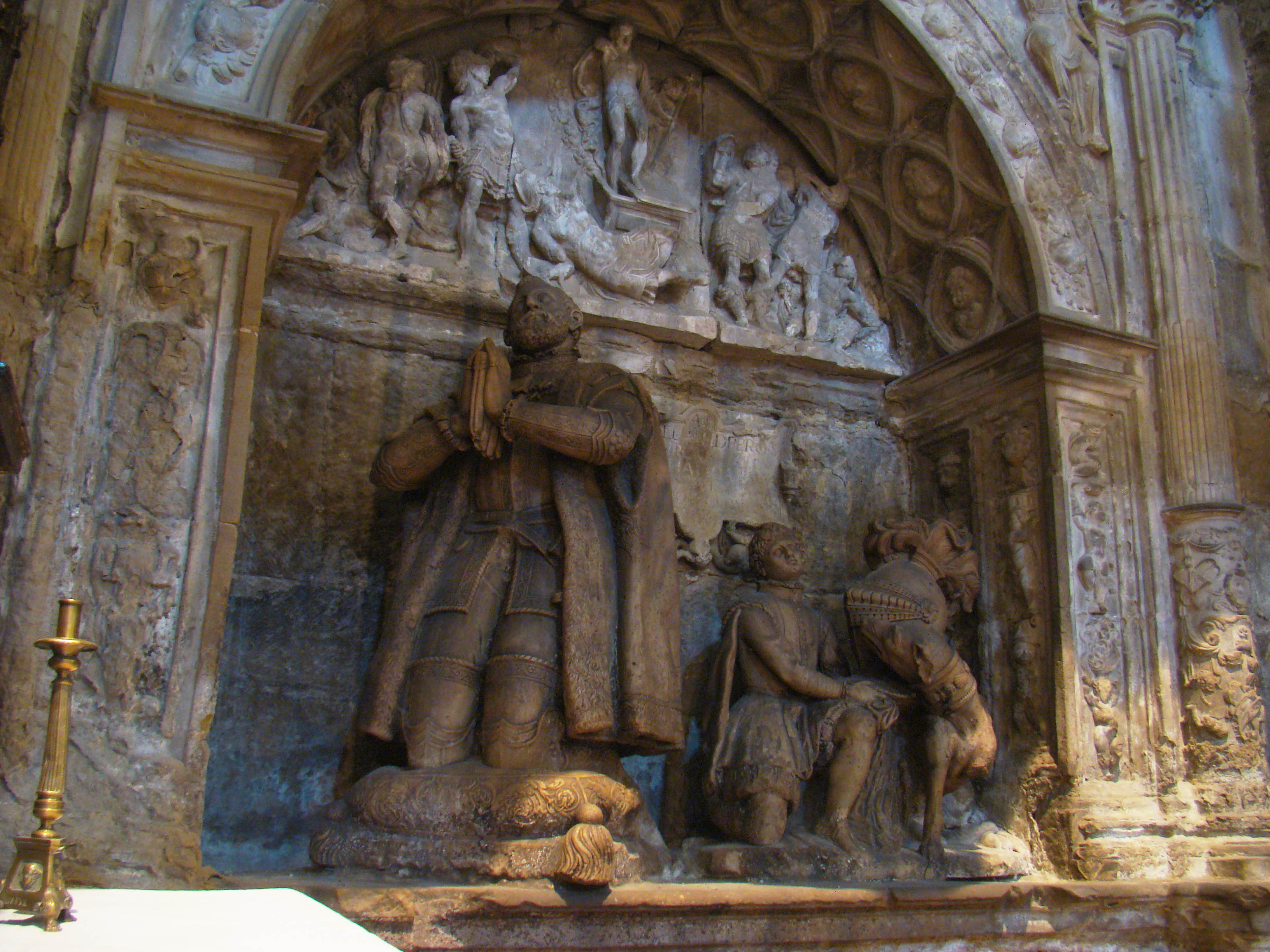 Iglesia de Nuestra Señora de la Asunción en Briones, La Rioja (España). Capilla de los Ircio o de los Hircio. Se terminó de construir en 1568. Fundada por los hermanos Hircio: Martín fue alcalde y Pedro compañero de viaje de Hernán Cortés en la conquista de México. Sepulcro en arcosolio. El extradós con ángeles y el tímpano con escenas de la Resurrección. Escultura de Pedro de Hircio, obra de Pedro Arbulo.